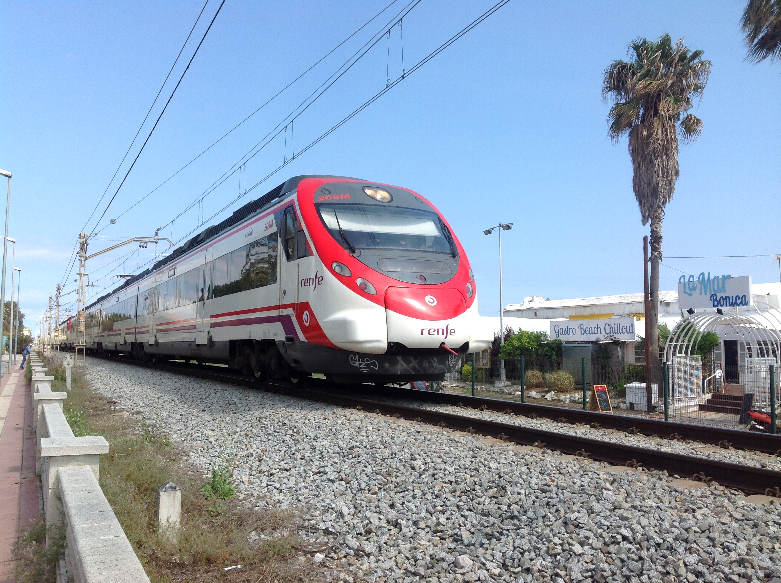 Malgrat de Mar. Blanes-Barcelona service.